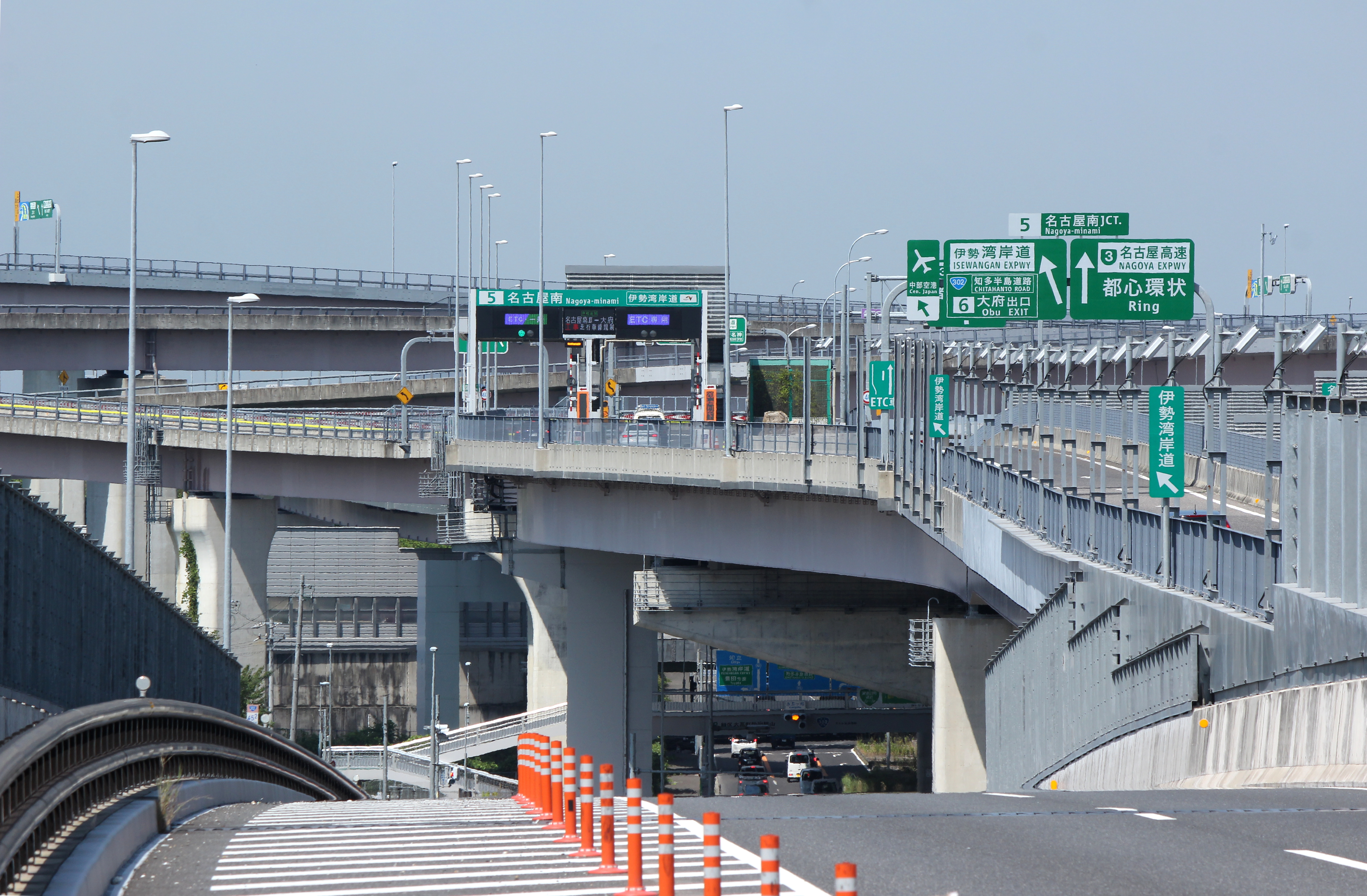 名古屋南ジャンクション。国道302号有松方面からJCTを臨む。